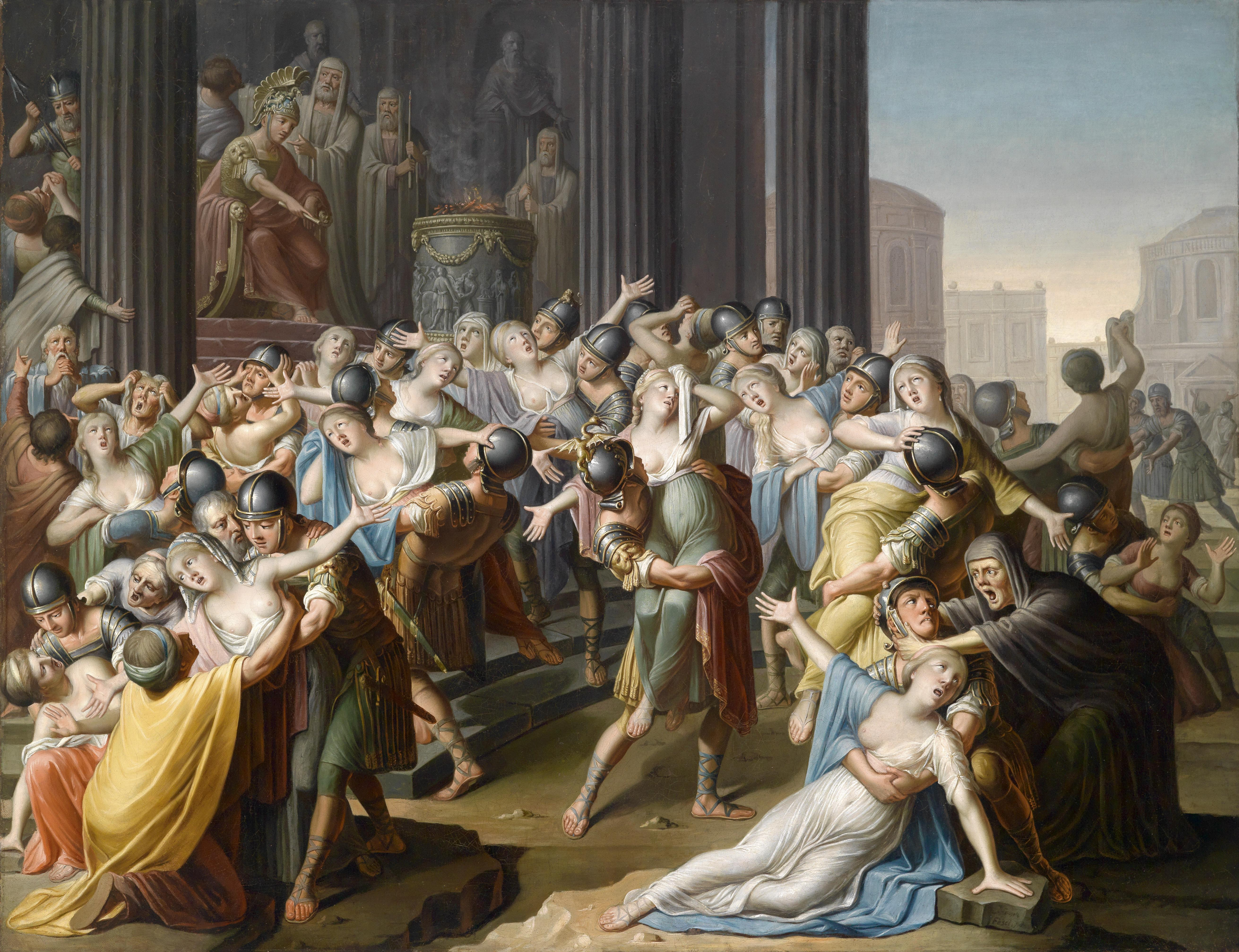 Der Raub der Sabinerinnen, unten rechts signiert und datiert 1801, rückseitig ebenfalls signiert und datiert, Öl auf Leinwand, 102 x 132 cm